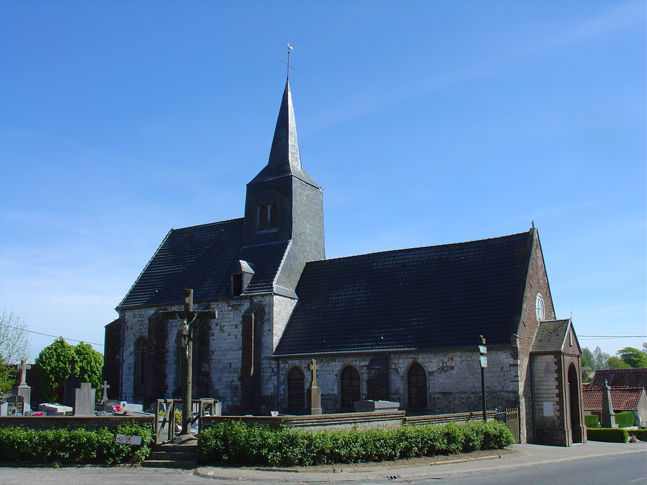 Église de Zoteux